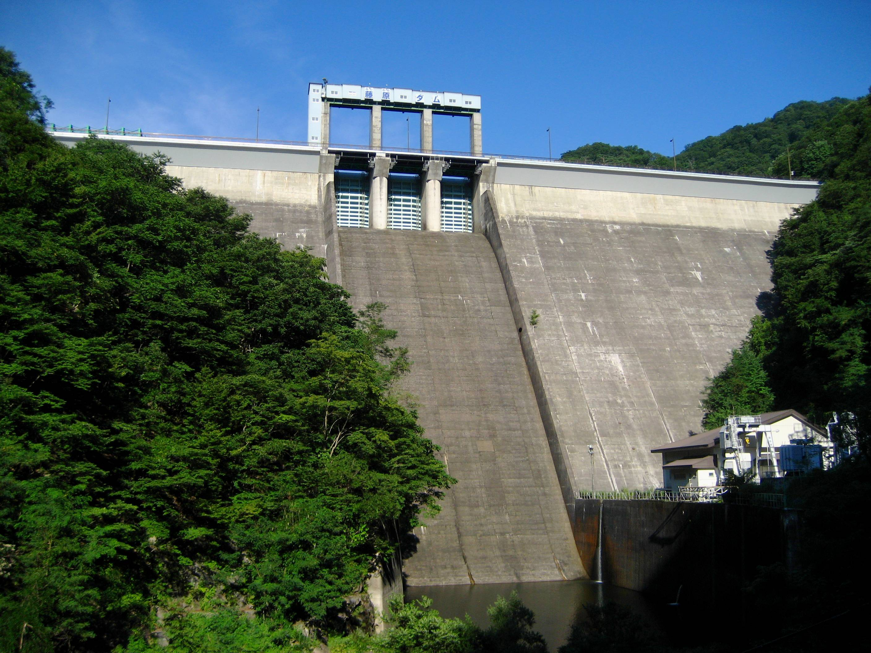 Fujiwara Dam (藤原ダム) in Minakami, Gunma, Japan.